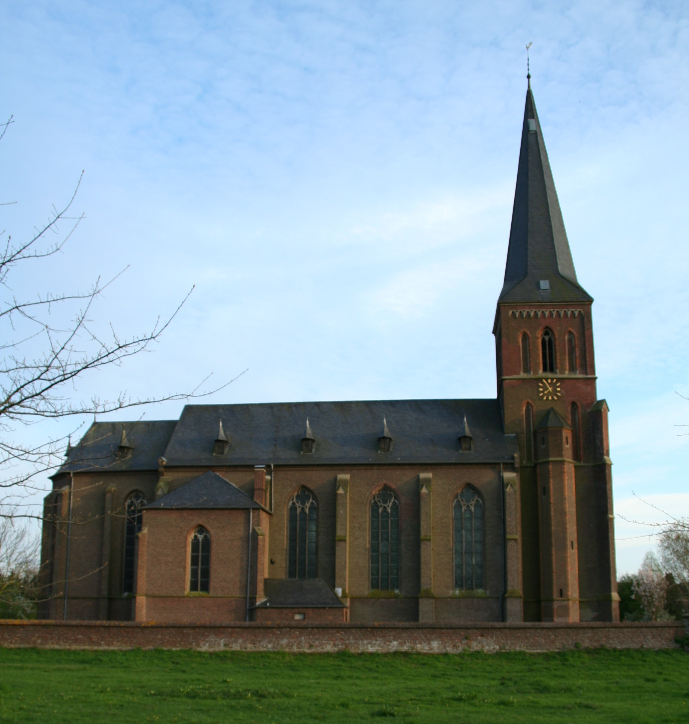 St. Stephanus-Kirche, Kessel, Goch, NRW, Germany